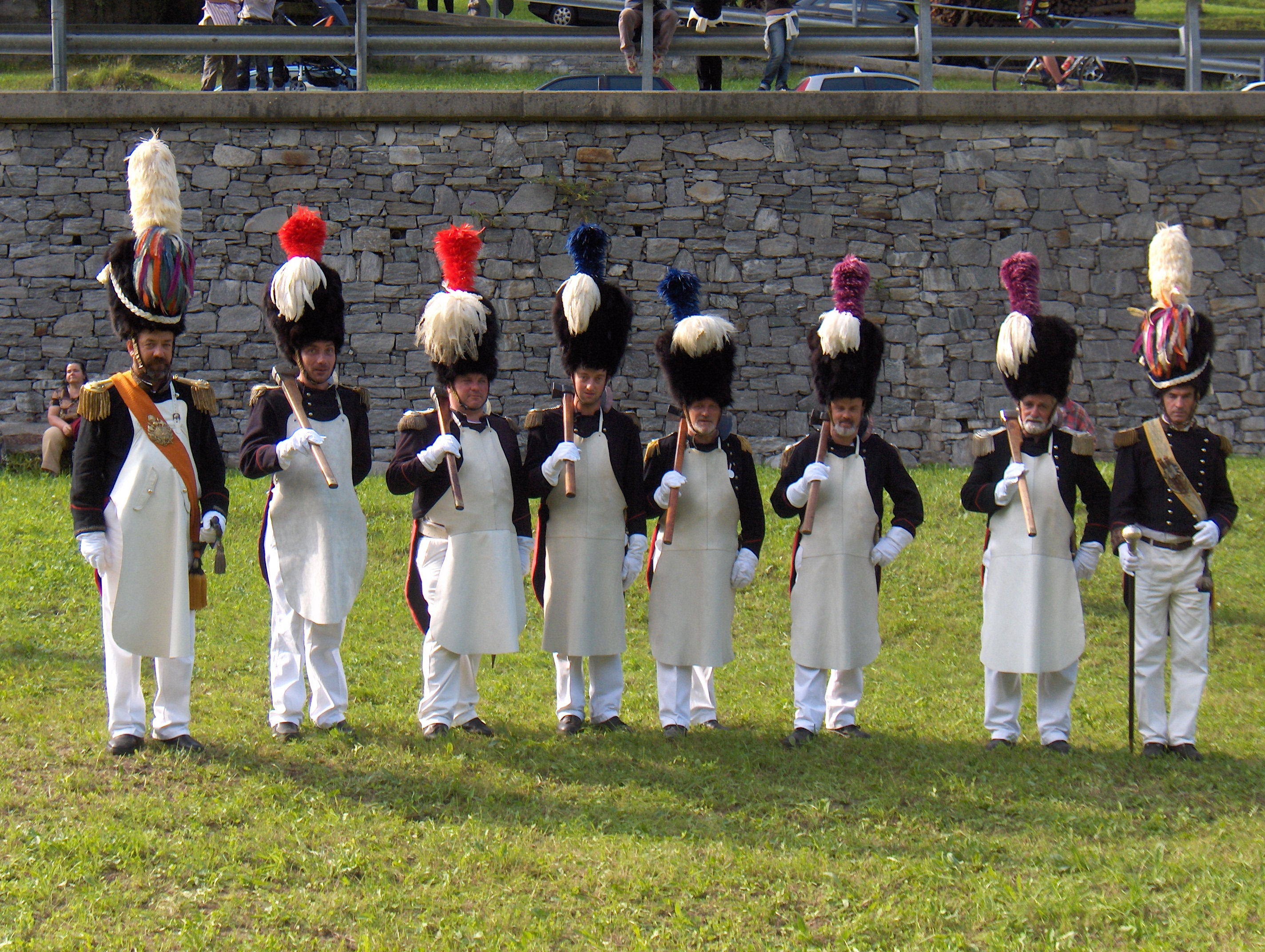 ZAPPATORI